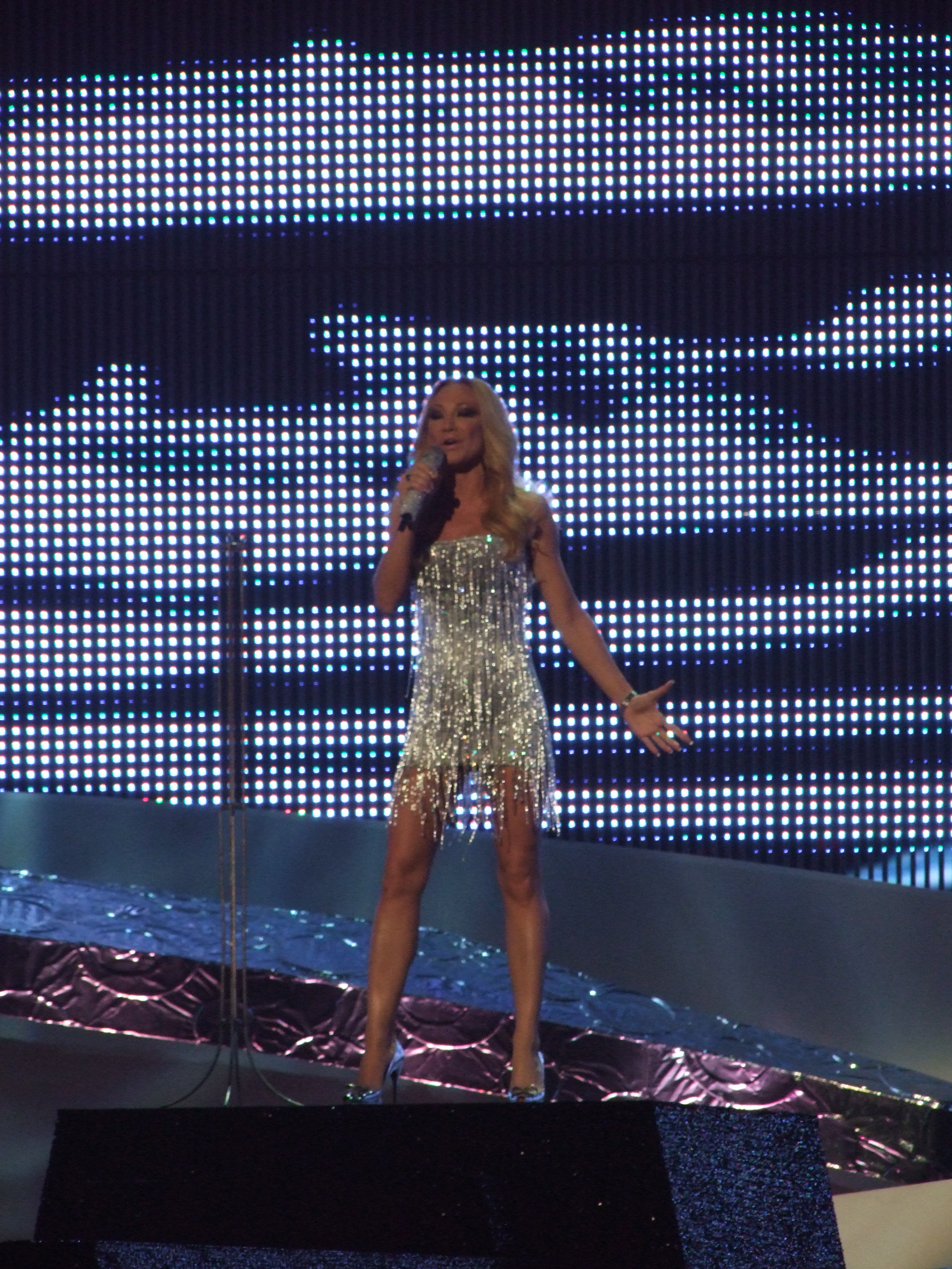 Final Eurovision 2008